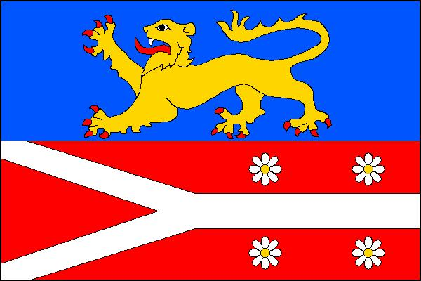 Vlajka obce Heřmanice (okres Náchod)